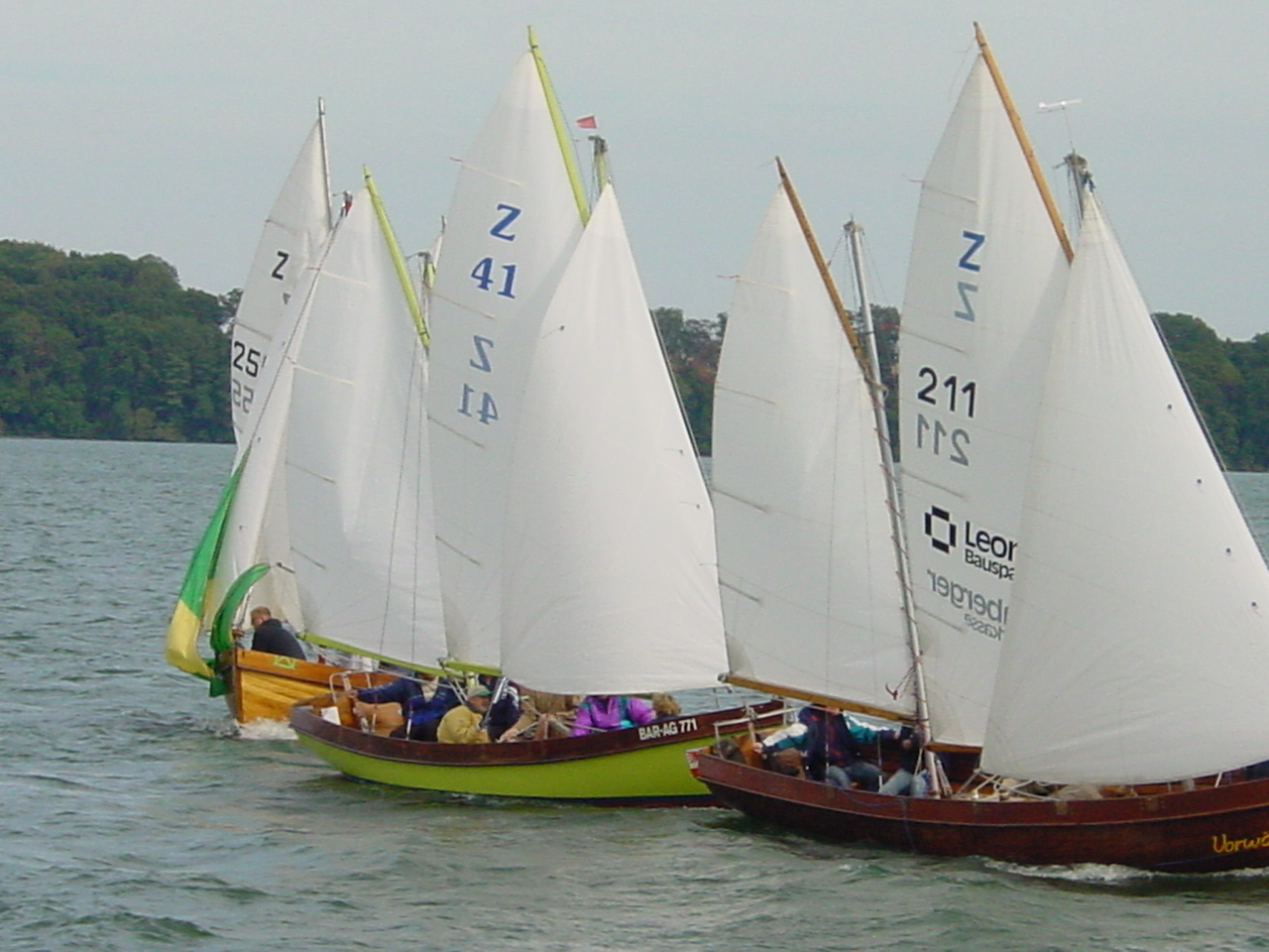 Regatta Kutter ZK 10 Kampf um jeden Meter